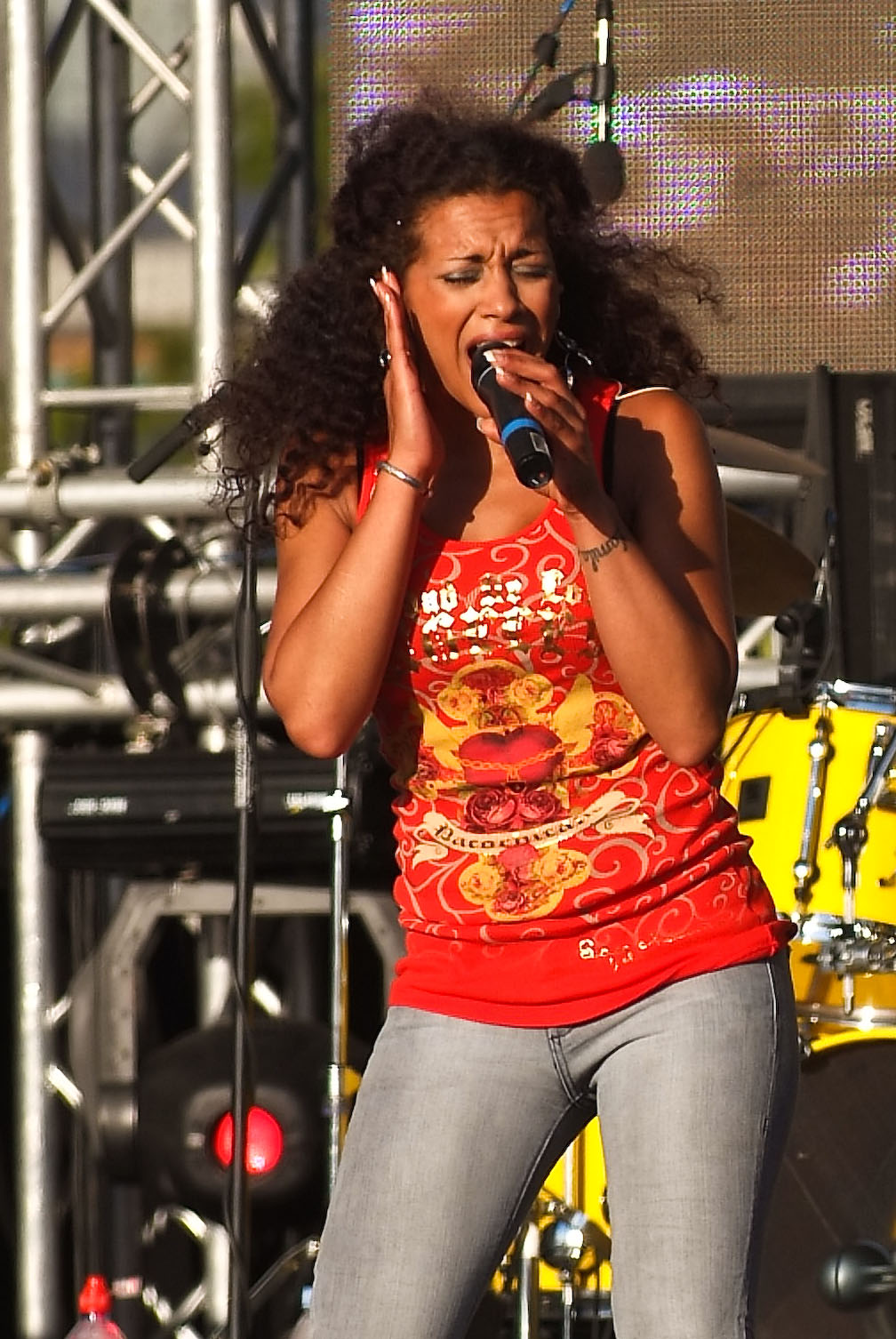 Nadja Benaissa of No Angels